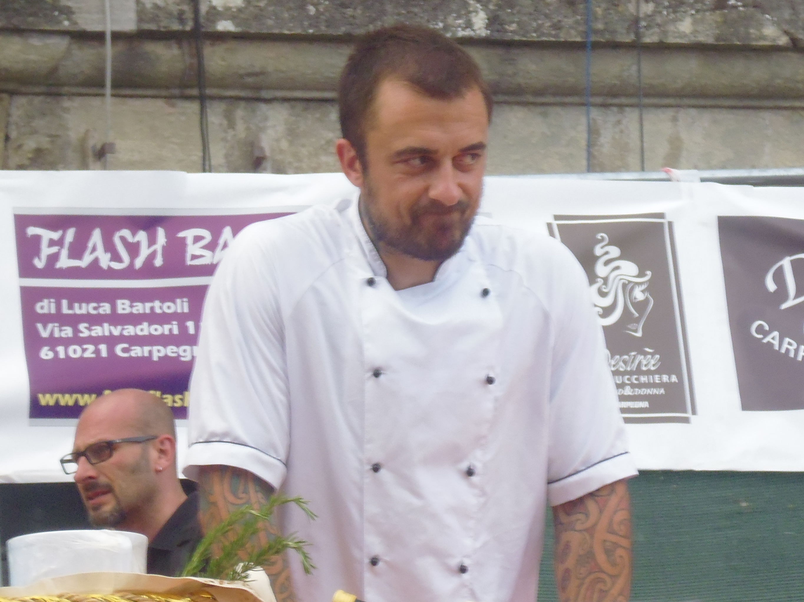 Chef Rubio a Carpegna